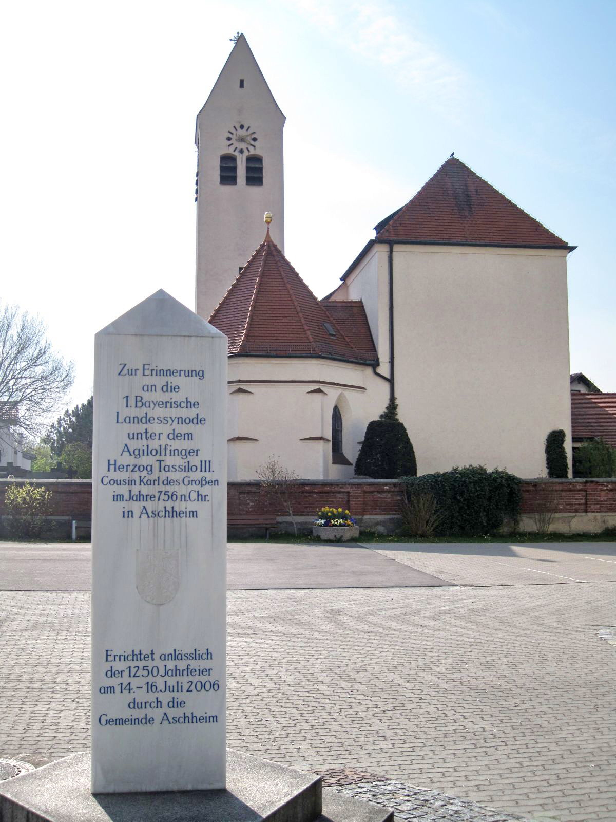 Aschheim, Kirche St. Peter und Paul und Gedenkstein an die 1. Bayerische Landessynode im Jahre 756 n.Chr. (2006)